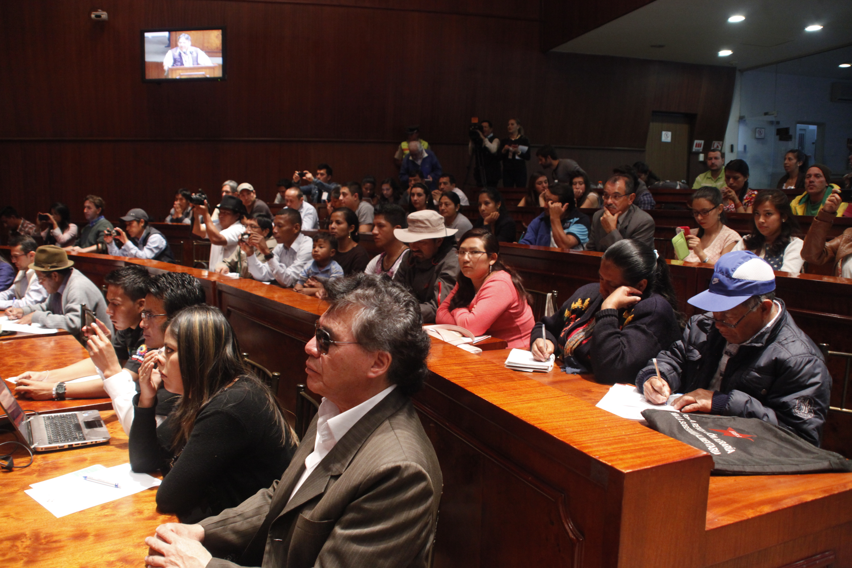 18 de junio de 2015.- Foro Taller “Turismo Comunitario en el Ecuador”: Desde la Gestión Comunitaria Hacia las Políticas Públicas Nacionales organizado por la Comisión de Desarrollo Económico y el Ministerio de Turismo Fotografía: Hugo Ortiz / Asamblea Nacional